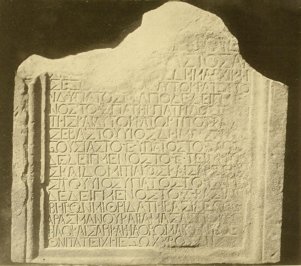 "xxxxxxxxxxxxxxxxxxxxxxx •ΑΔ•ΥΠΑ•ΤΟΣΤΟ•F•ΑΠΟΔΕΔΕΙΓΜΕ ΝΟΣΤΟ•Ζ•ΠΑΤΗΡ•ΠΑΤΡΙΔΟ•xxxxx ΤΗΣ•ΚΑΙ•ΑΥΤΟΚΡΑΤΩΡ•ΤΙΤΟ•xxxxx ΣΕΒΑΣΤΟΥ•ΥΙΟΣ•xxxxx ΞΟΥΣΑΣΤΟ•Ε•ΥΠΑ•ΤΟΣΤΟ•Δ•ΑΠΟ ΔΕΔΕΙΓΜΕΝΟΣΤΟ•E•Τxxxxx ΣΚΑΙ•ΔΟΜΙΤΙΛΙΘΟΣ•ΚΑΙΣΑΡ•xxxxx ΣΤΟΥ•ΥΙΟΣ•ΥΠΑ•ΤΟΣΤΟ•Γ•ΑΠΟ ΔΕΔΕΙΓΜΕΝΟΣΤΟ•Δ•ΒΑΣΙΛΕ•Ι ΒΗΡΩΝ•ΜΙΘΡΙΔΑΤΗ•ΒΑΣΙΛΕΟΣ•Φ ΑΡΑΣΜΑΝΟΥ•ΚΑΙ•ΙAMAZAxxxxx ΦΙΛΟ•ΚΑΙΣΑΡΙ•ΚΑΙ•ΦΙΛΟ•PΩMA•xxxxx ΘΝΙΤΑ•ΤΕΙΧΗ•ΕΞΩ•ΧΥΡΟΣ•xx"